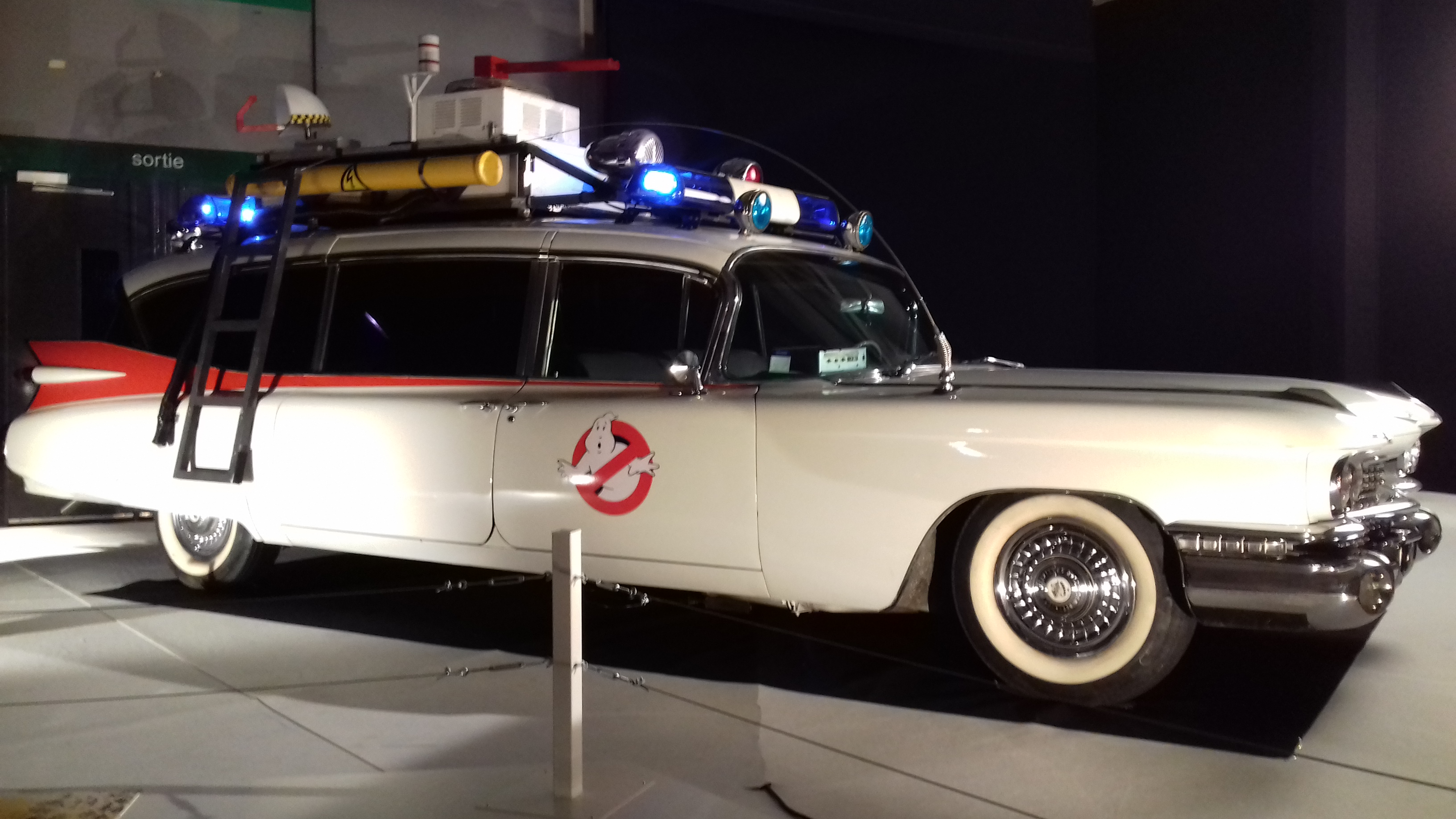 Cadillac Miller-Meteor Ecto 1 (SOS Fantômes) à l'exposition Moteur ! L'automobile fait son cinéma, au Mondial de Paris 2016